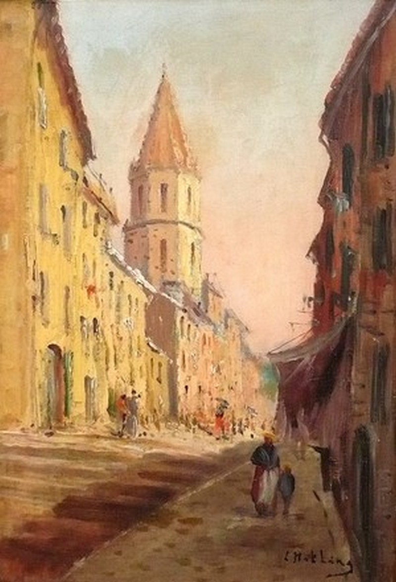 La Montée des Accoules, Marseille de Louis Nattero, huile sur panneau signée en bas à droite - 40 x 28 cm